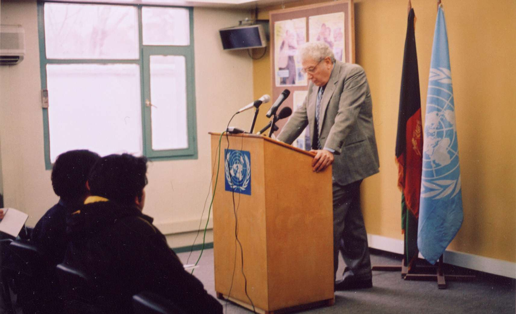 Prof. Cherif Bassiouni in qualità di esperto dell'ONU per i diritti umani in Afghanistan